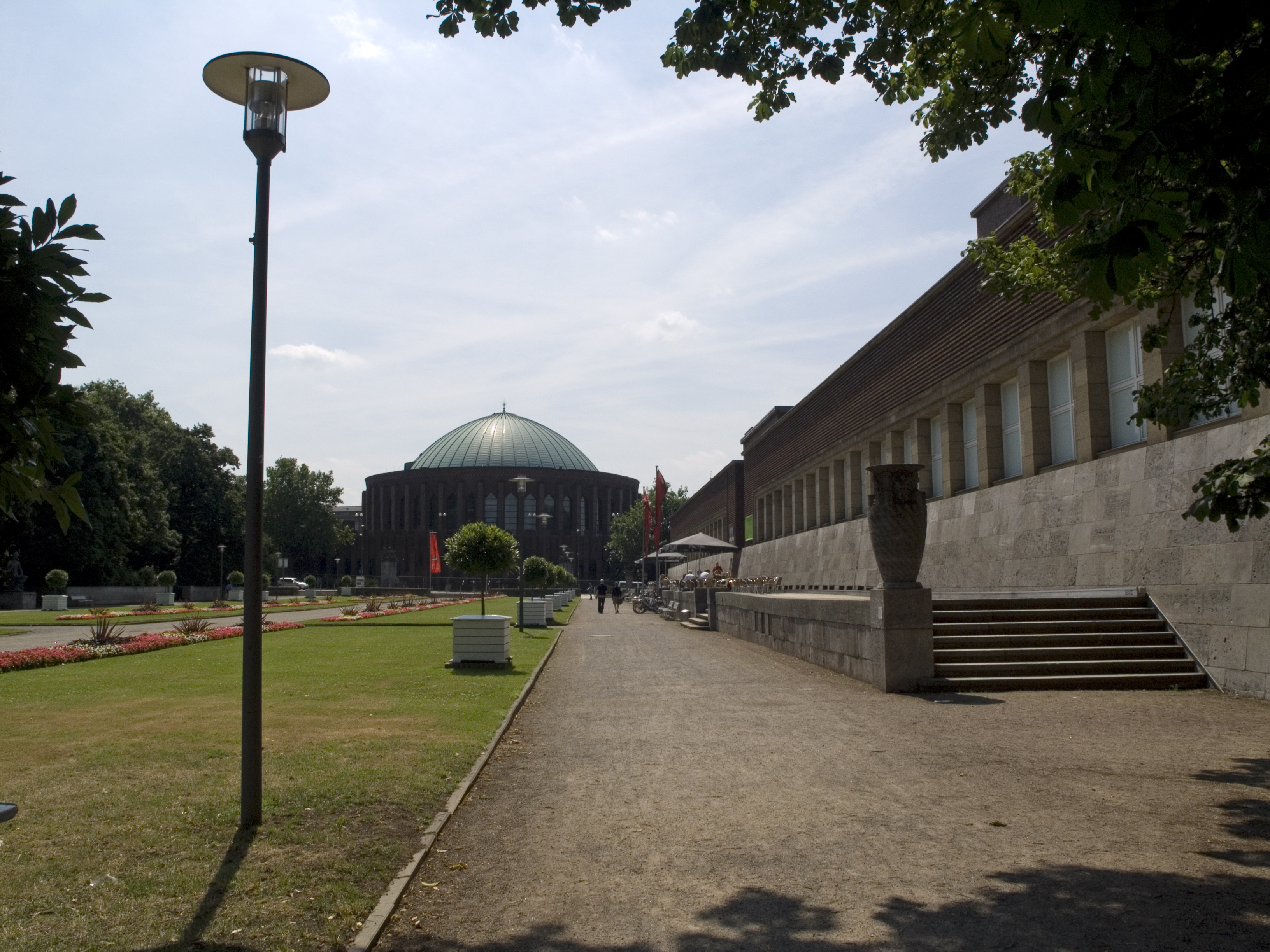 Северный Рейн - Вестфалия, Дюссельдорф. Памятник Вестфальским уланам